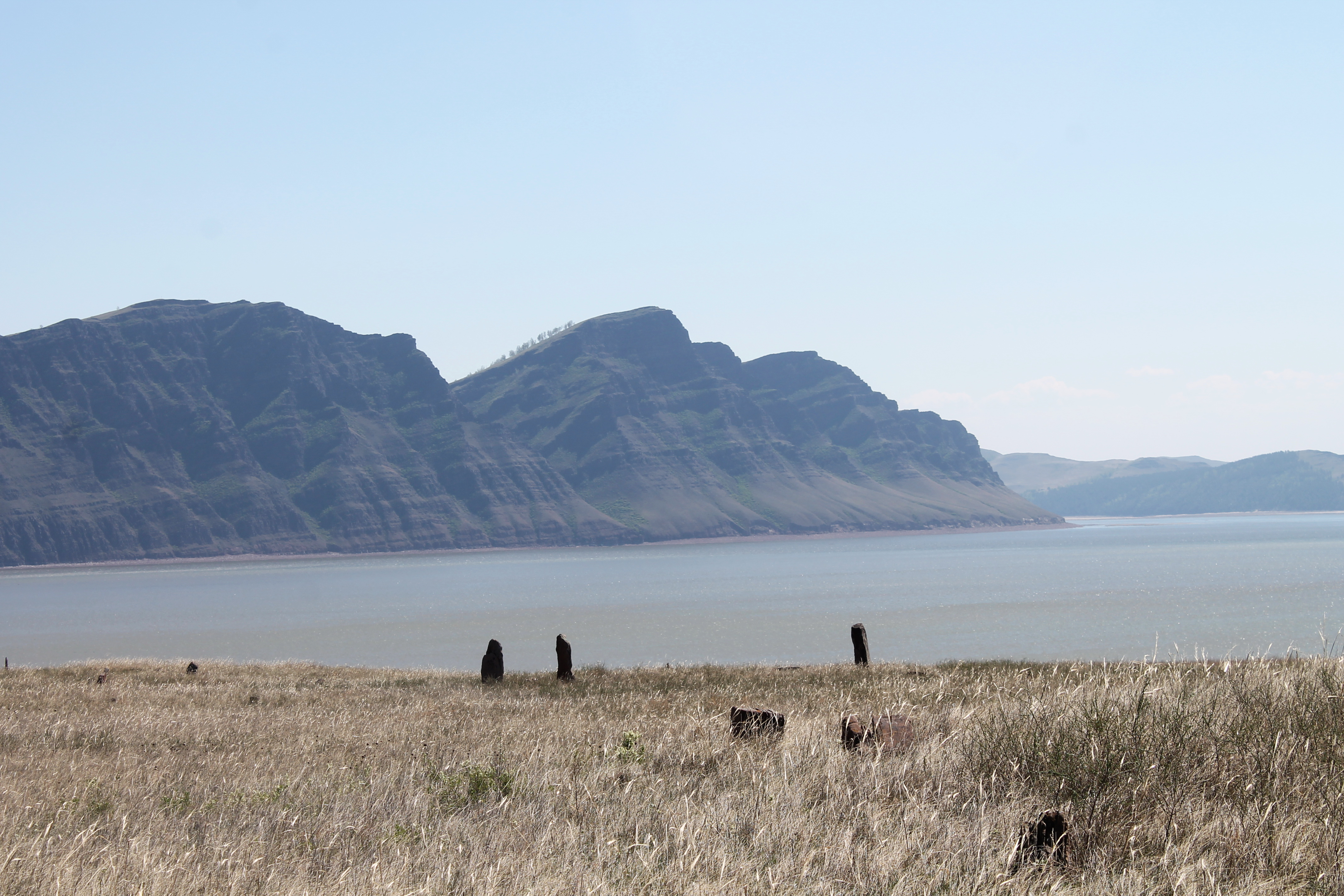 Оглахтинская крепость, Боградский район This image is related to the protected area of Russia number 1910043